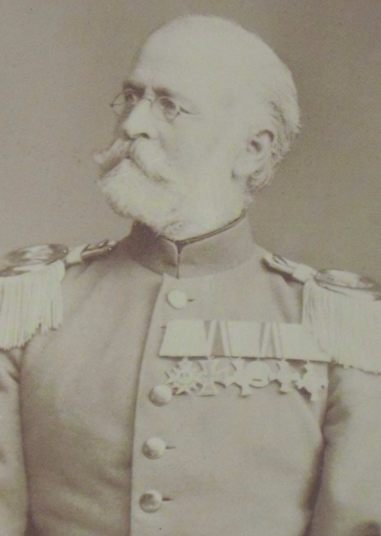 Karl Ritter von Popp auf einer Tafel des Eichstätter Museums für Ur- und Frühgeschichte